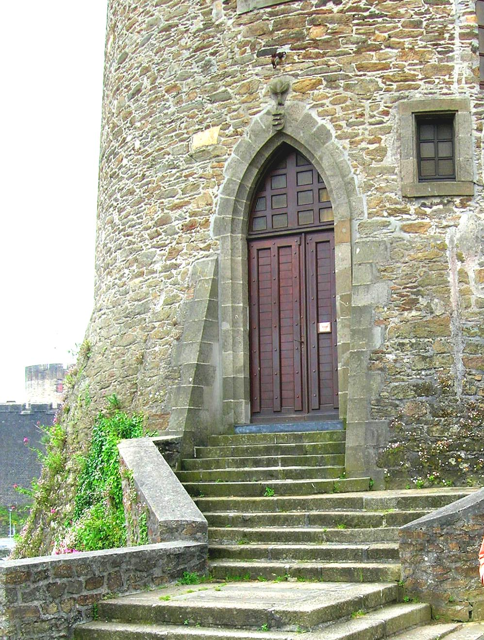 D'Tour Tanguy (2006).